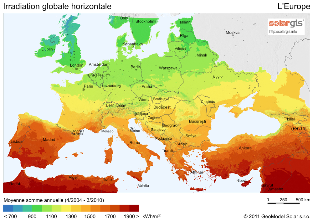 Solar Radiation Map of Europe: Irradiation Globale Horizontale en Europe, SolarGIS 2011